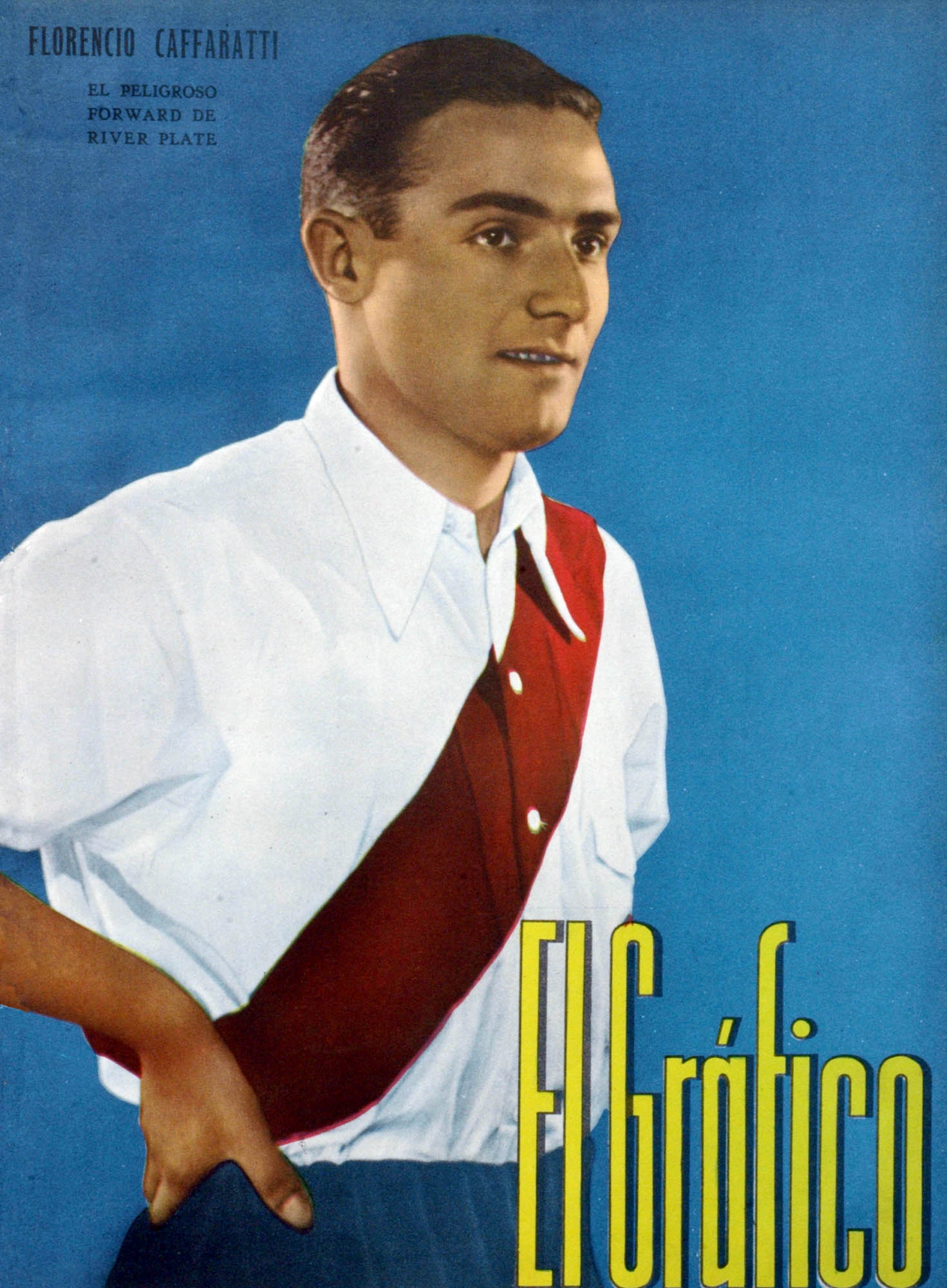 El Grafico del 27 de Octubre de 1939. Edicion 1059